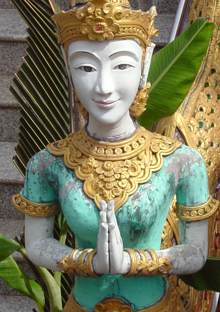 beeld bij tempel in Thailand (foto Wouter Hagens); figure in W:Anjali mudra